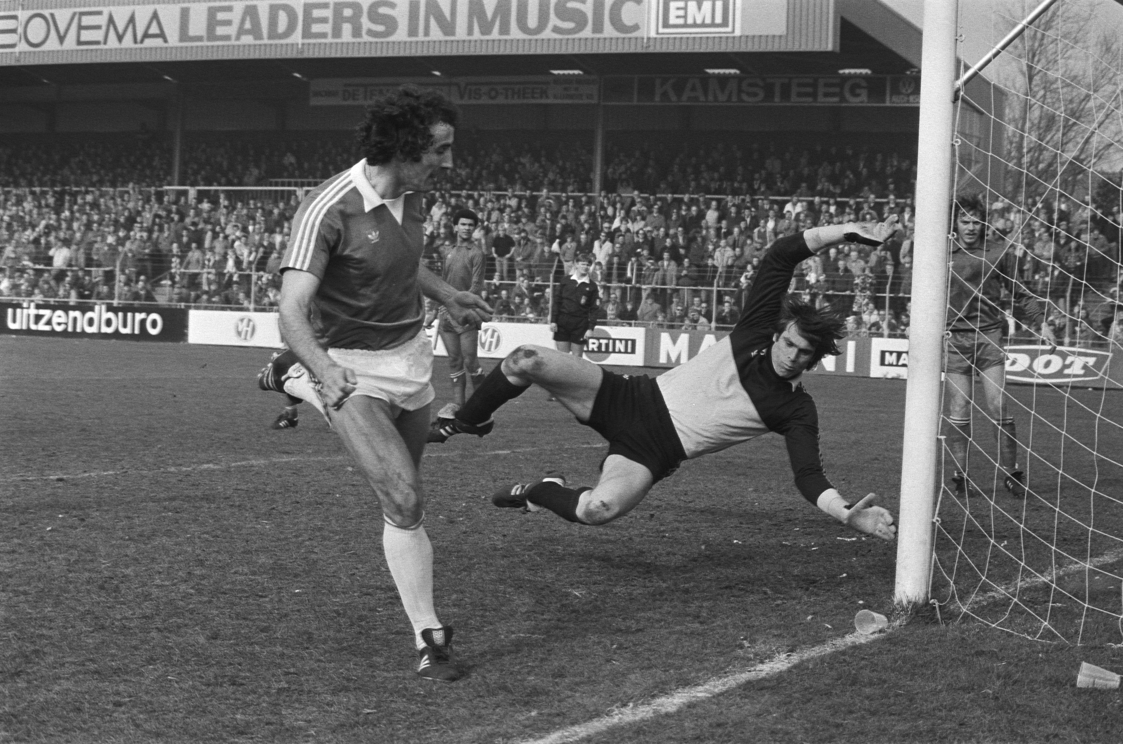 Collectie / Archief : Fotocollectie Anefo Reportage / Serie : [ onbekend ] Beschrijving : Haarlem tegen AZ 67 0-3; Welzl (links) scoort 2e doelpun Haarlem doelman Boersma duikt tevergeefs Datum : 23 maart 1980 Locatie : Haarlem Trefwoorden : sport, voetbal Fotograaf : Suyk, Koen / Anefo Auteursrechthebbende : Nationaal Archief Materiaalsoort : Negatief (zwart/wit) Nummer archiefinventaris : bekijk toegang 2.24.01.05 Bestanddeelnummer : 930-7394